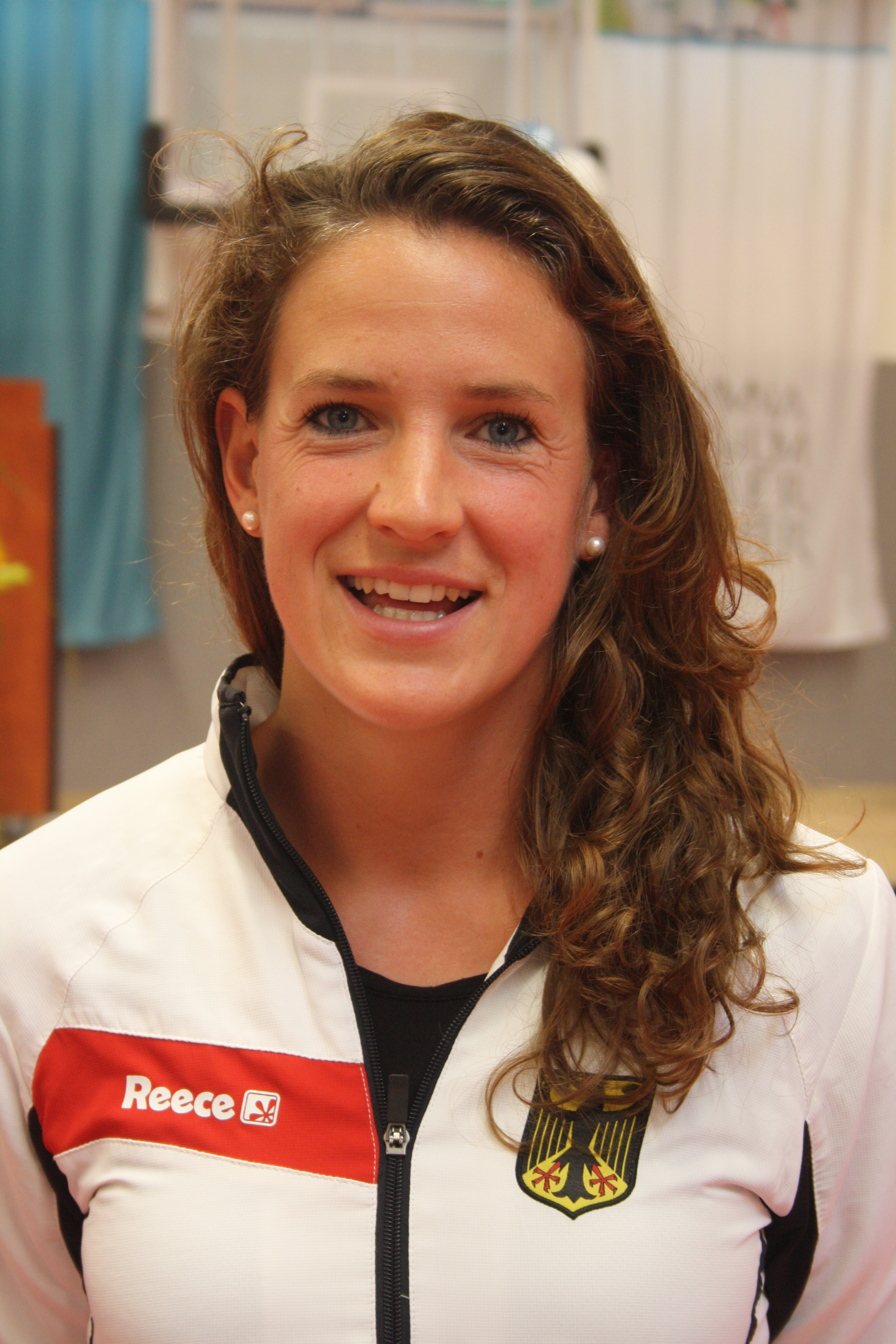 Janne Müller-Wieland bei der Einweihung der Drefachsporthalle des Gymnasium Oberalster